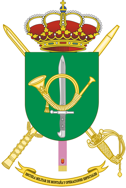 Nuevo escudo aprobado en 2020